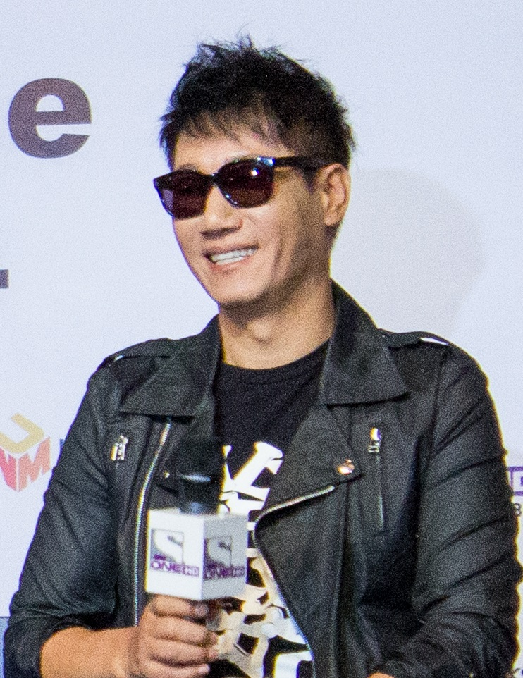 Ji Suk Jin at Malaysia for Running Man Fan Meeting Asian Tour 2014